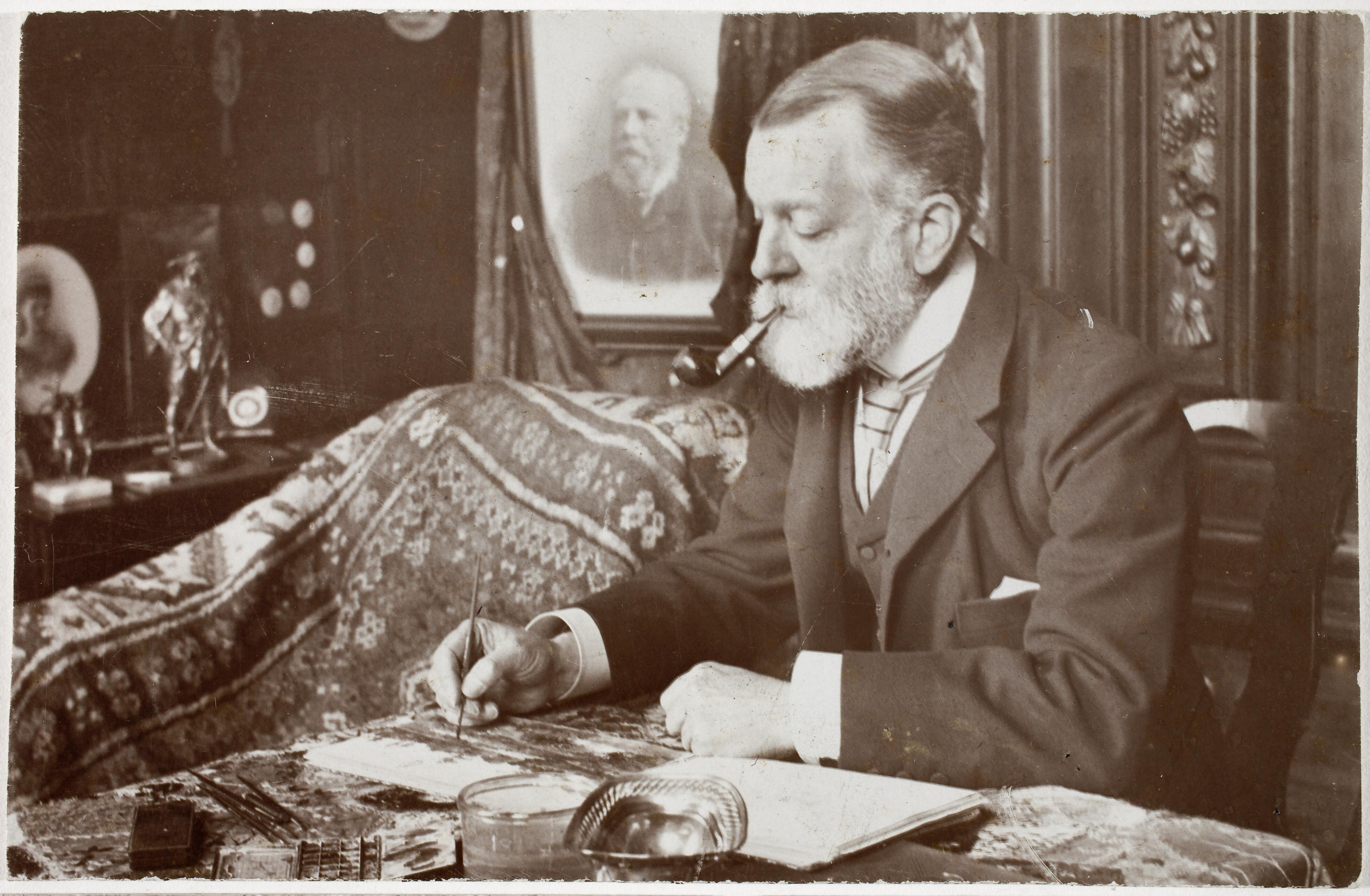 Jhr. Sebastiaan Mattheus Sigismund de Ranitz (1846-1916)